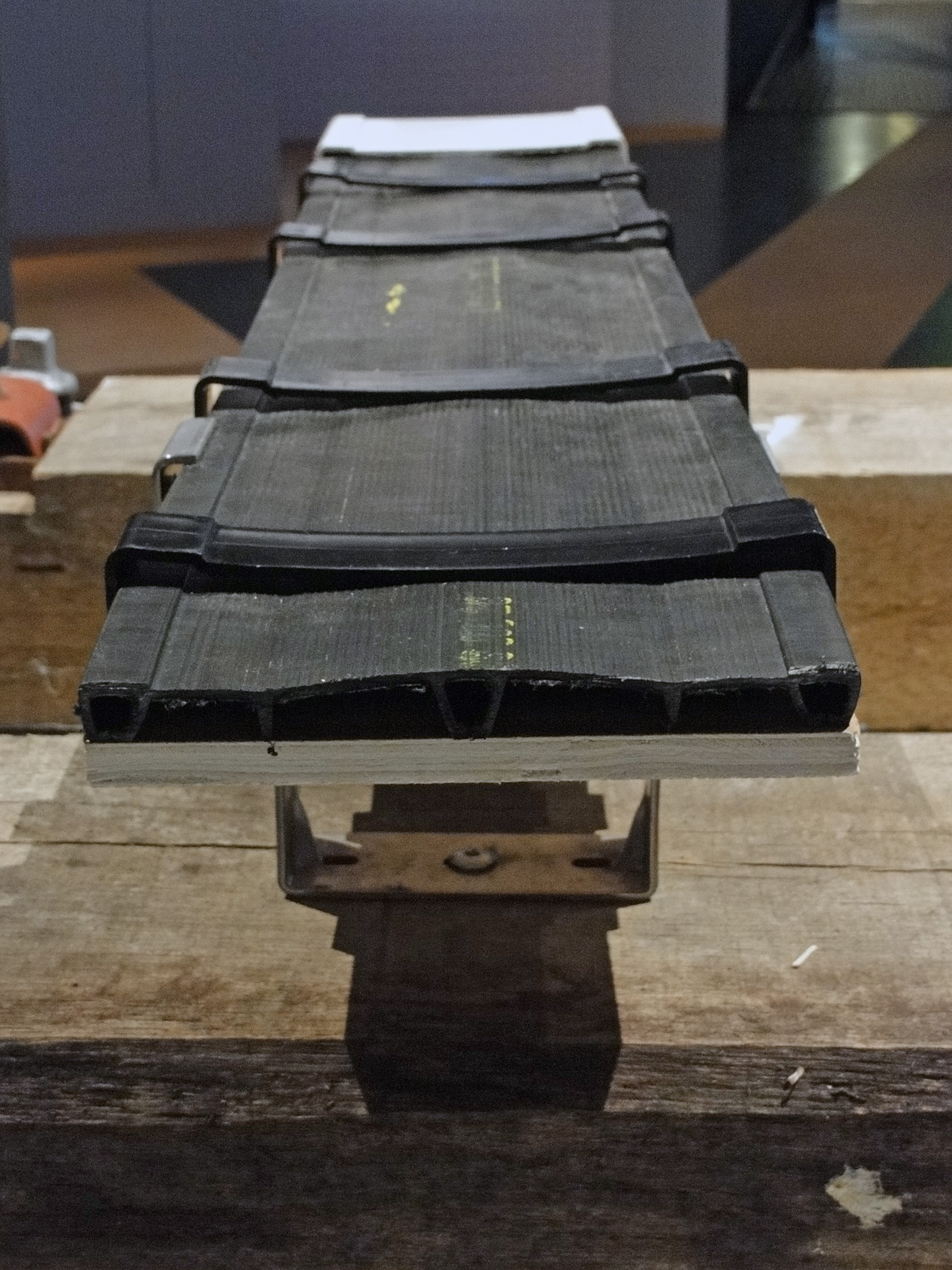 Tapis de pilotage automatique (PA) du métro de Paris, France.